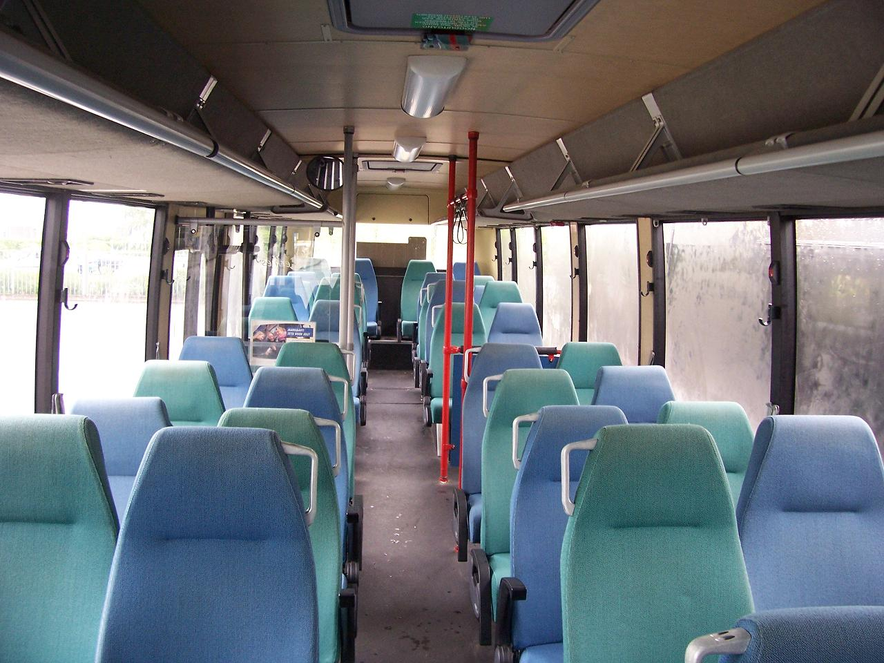 2+2 indeling van de Den Oudsten Alliance 8085 van Hermes in Heerlen.